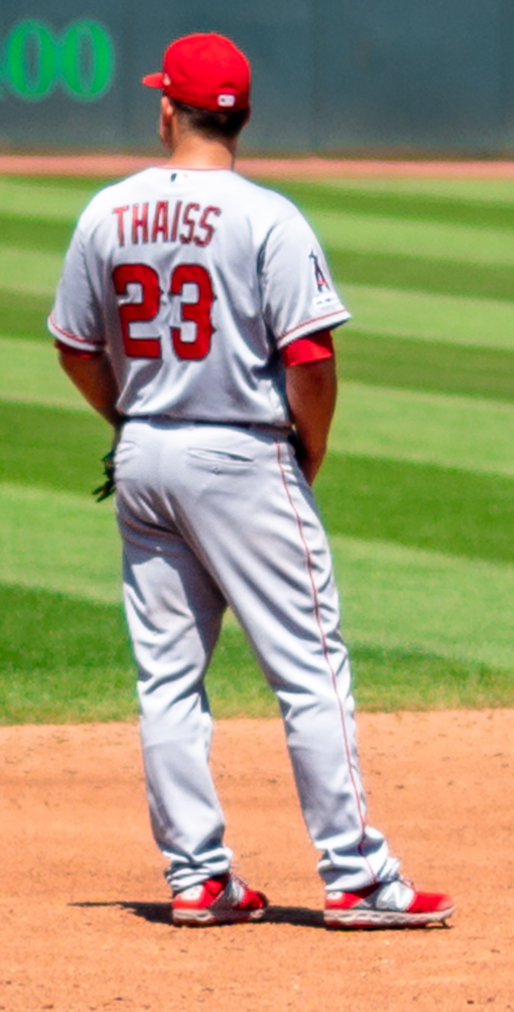 Los Angeles Angels VS. Cleveland Indians